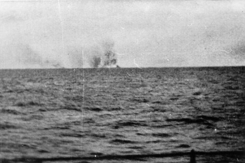 Teleaufnahme von der Detonation des größten Kriegsschiffs der Welt, Hood. Eine Panzersprenggranate der Bismarck hatte die achtere Munitionskammer zur Explosion gebracht. 300 m hoch war die Explosionswand, ein unheimliches Aschgrau, das von glühendroten und schwefelgelben Blitzen auseinander gerissen wurde. 1418 Mann fanden in diesem Inferno den Tod